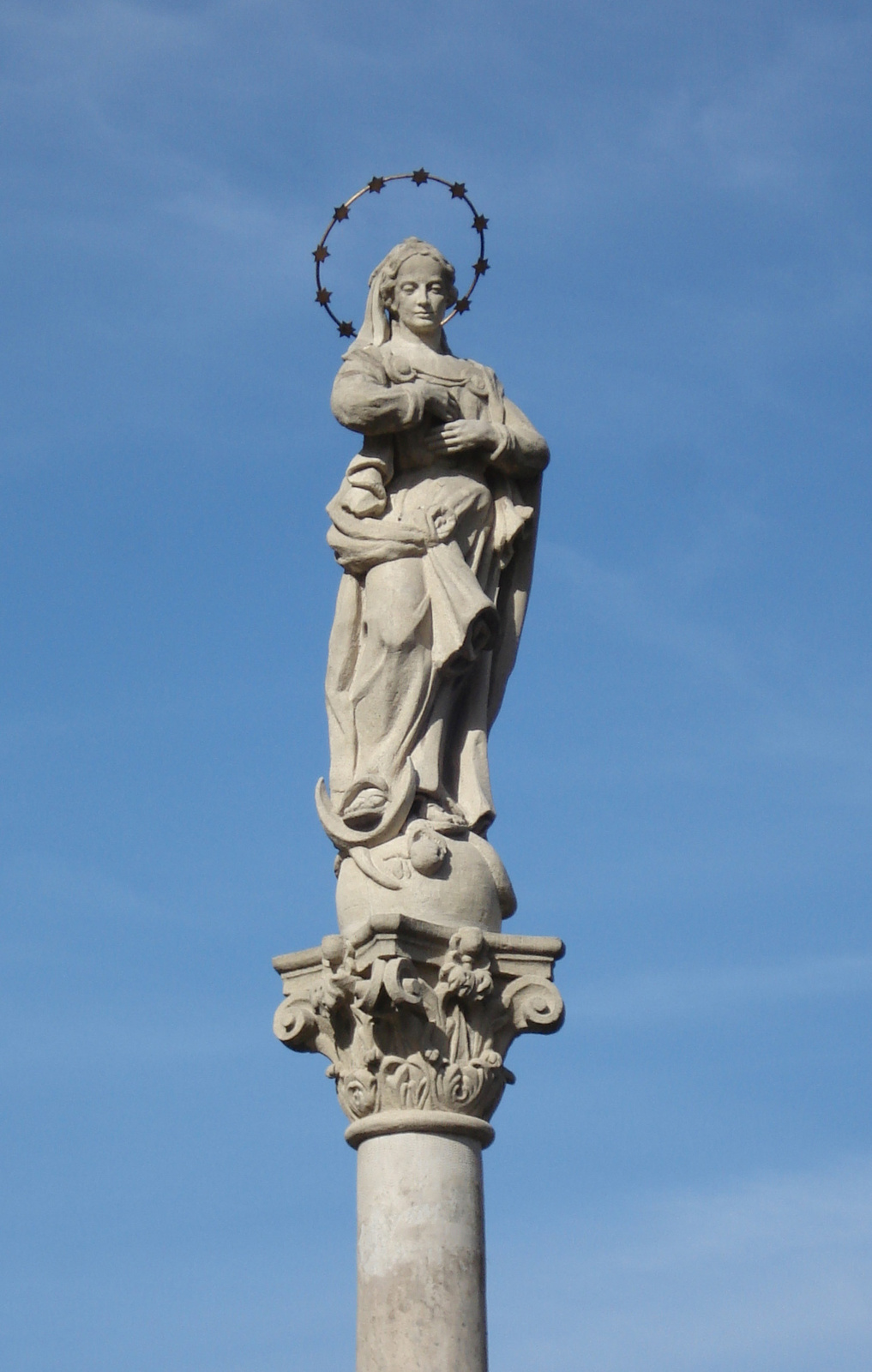 Mária szobor (Miskolc, Mindszent tér) This is a photo of a monument in Hungary. Identifier: 2957